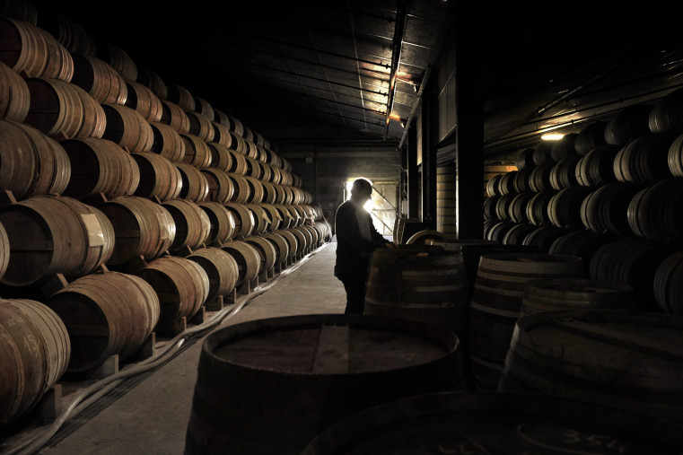 Chai à barrique pour le vieillissement d'eau-de-vie de Cognac au Domaine Boinaud